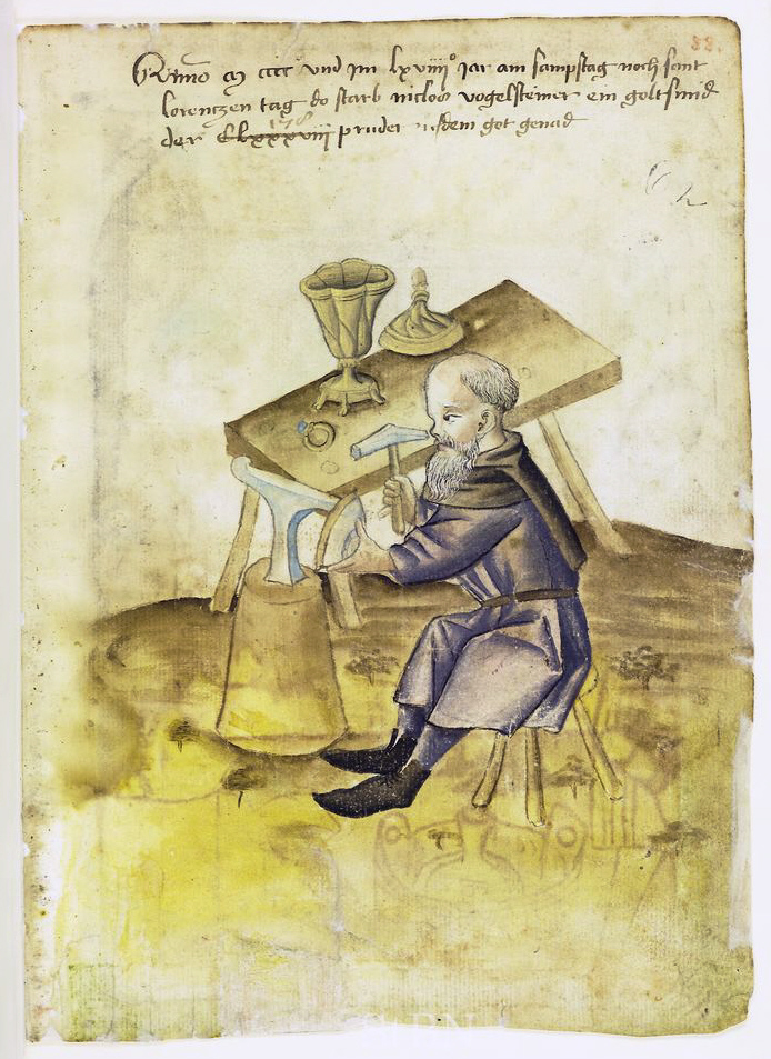 niclos (Niclas; Nikolaus) vogelsteiner (Vogelsteiner) , goltsmid (Goldschmied) Transkription und weitere Informationen